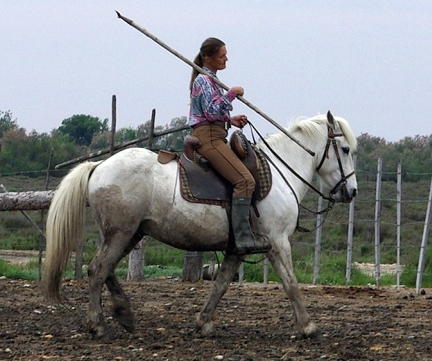 Monte professionnelle en Camargue